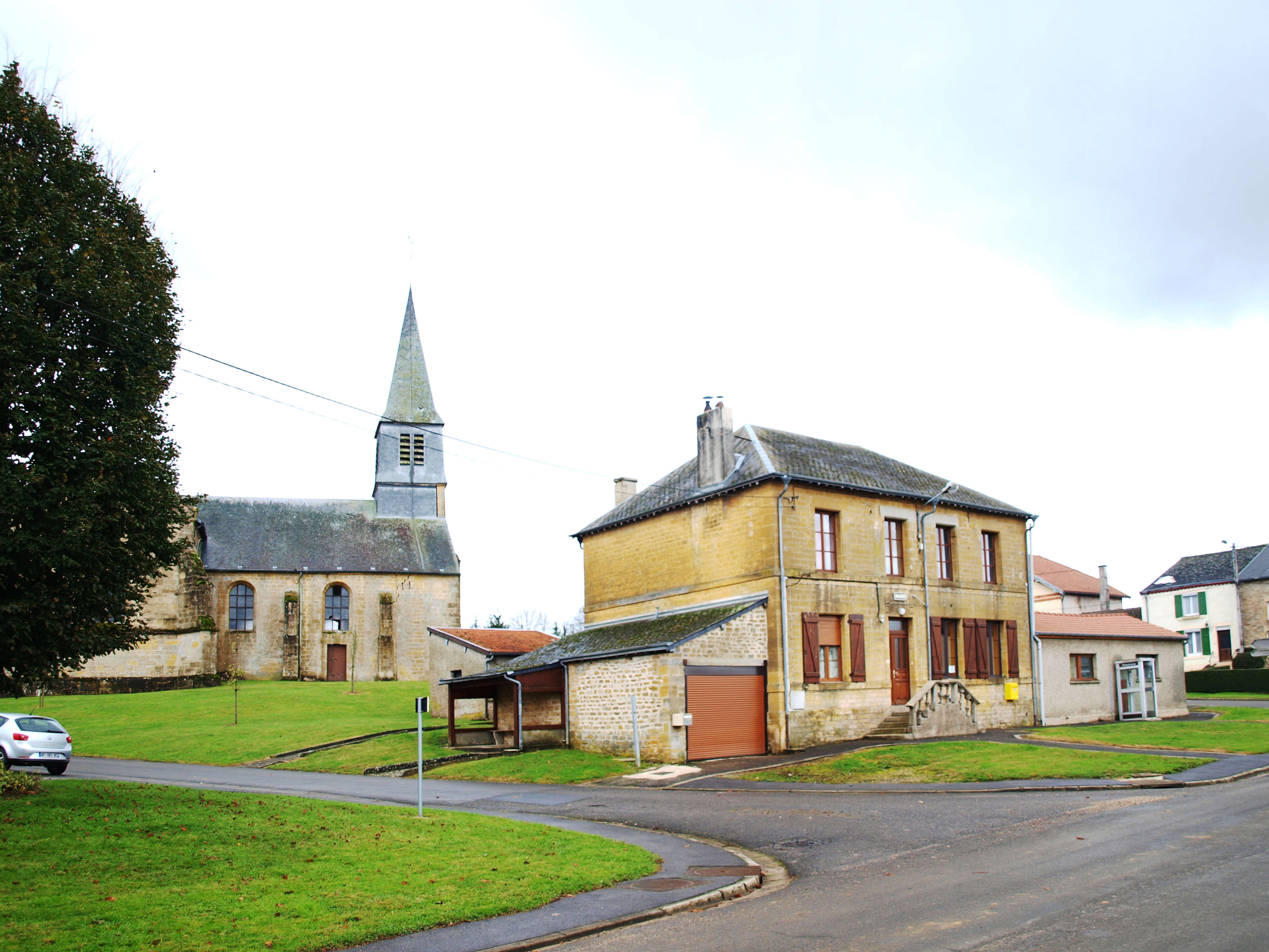 Belleville-et-Châtillon-sur-Bar (Ardennes, France) ; village de Châtillon-sur-Bar ; l'église & l'ex-mairie.